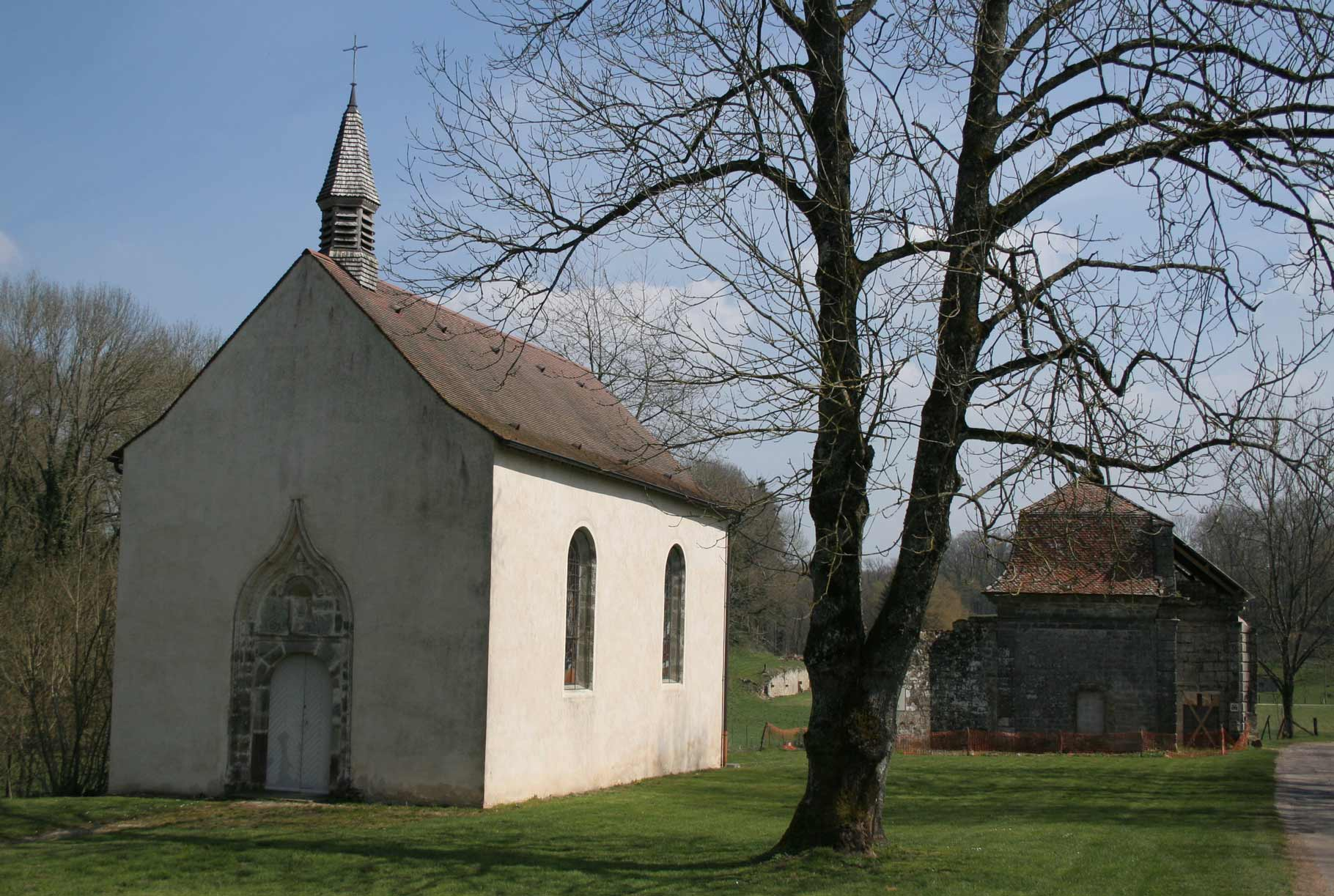 Chapelle à l'entrée du sîte en 2007